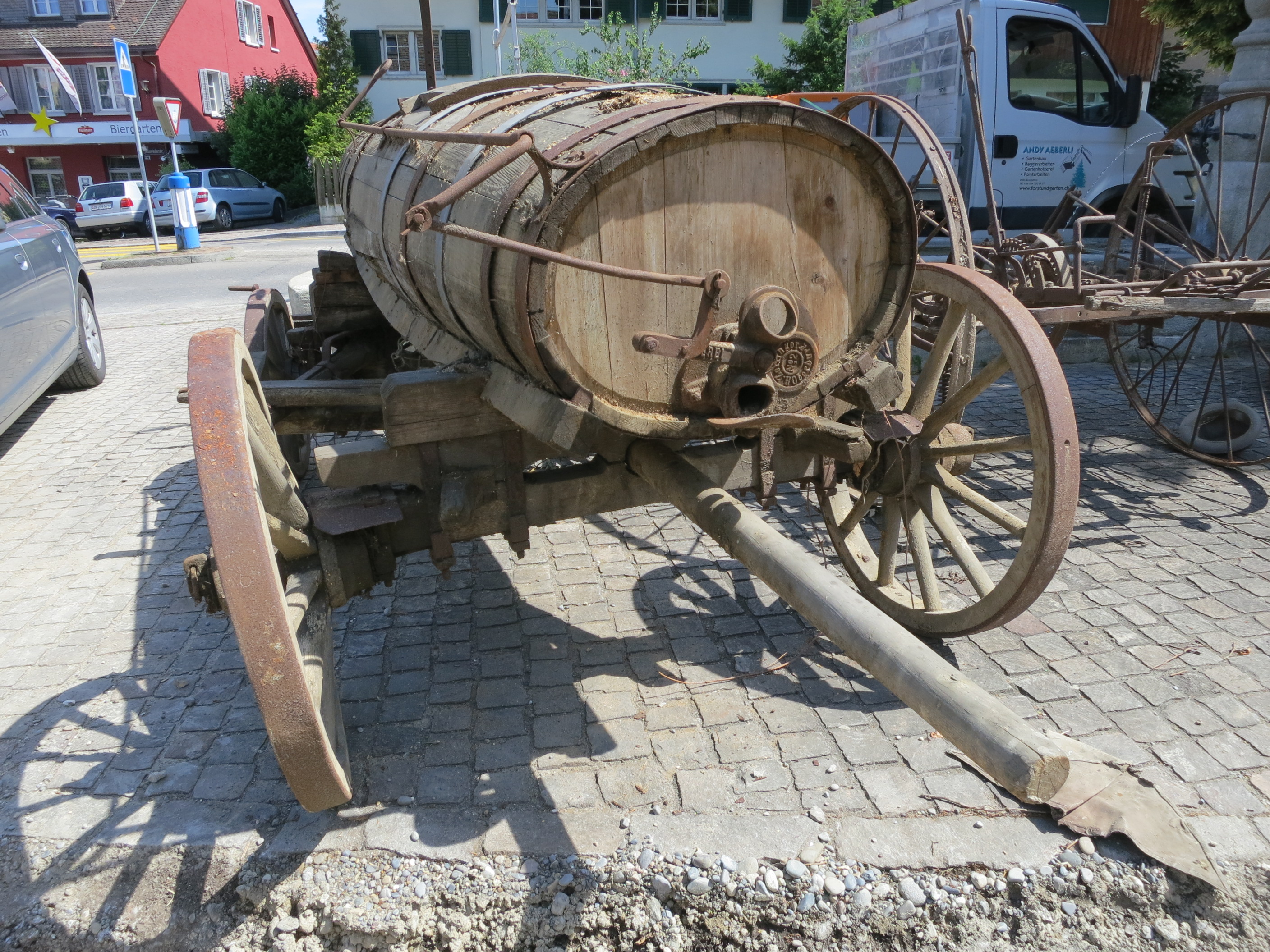 Güllenfass, Zürich-Albisrieden ZH, Schweiz